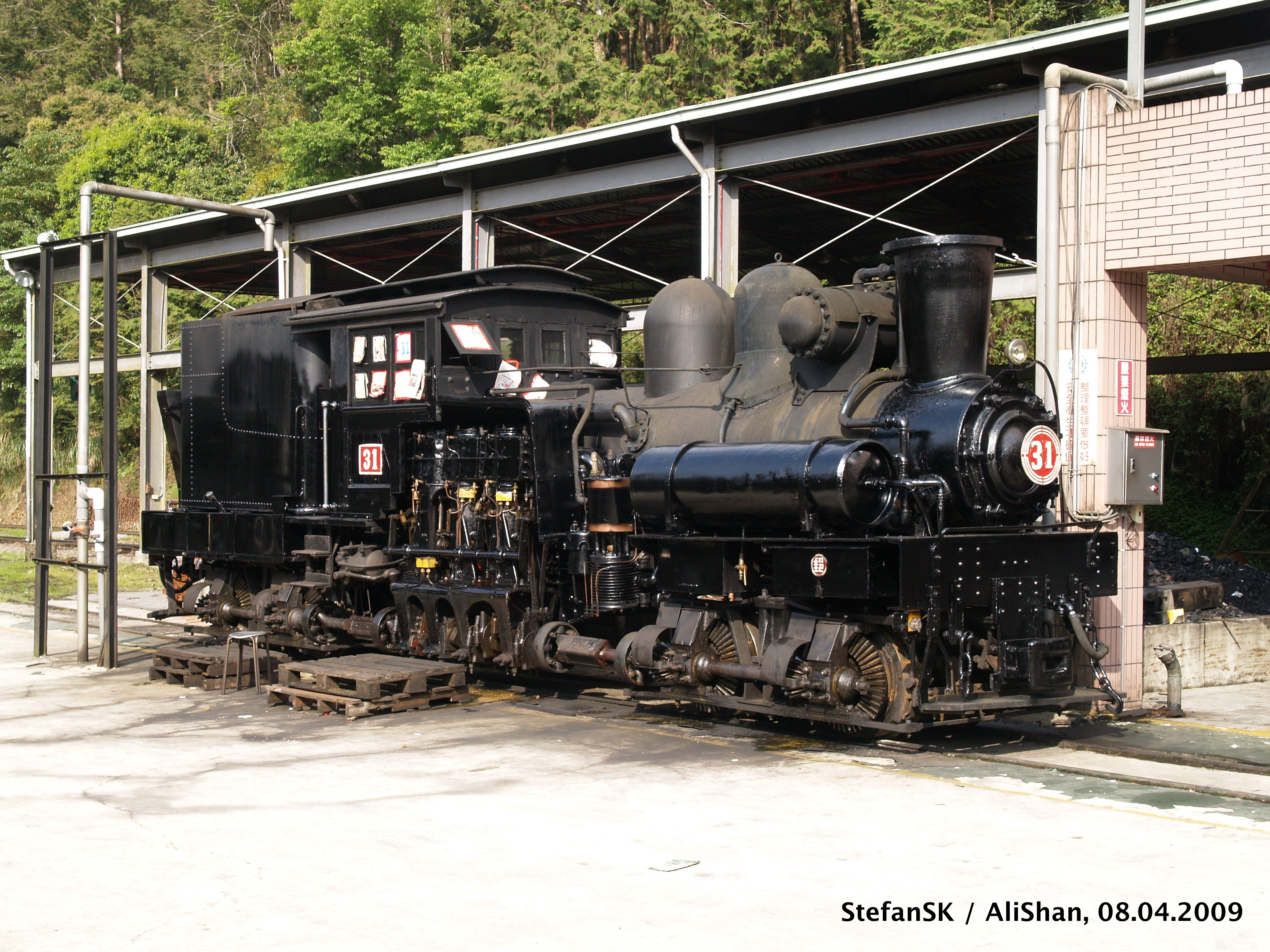 AliShan-Waldbahn Shay-Dampflok Nr. 31, betriebsfähig abgestellt im Betriebshof AliShan, fotografiert am 08.04.2009